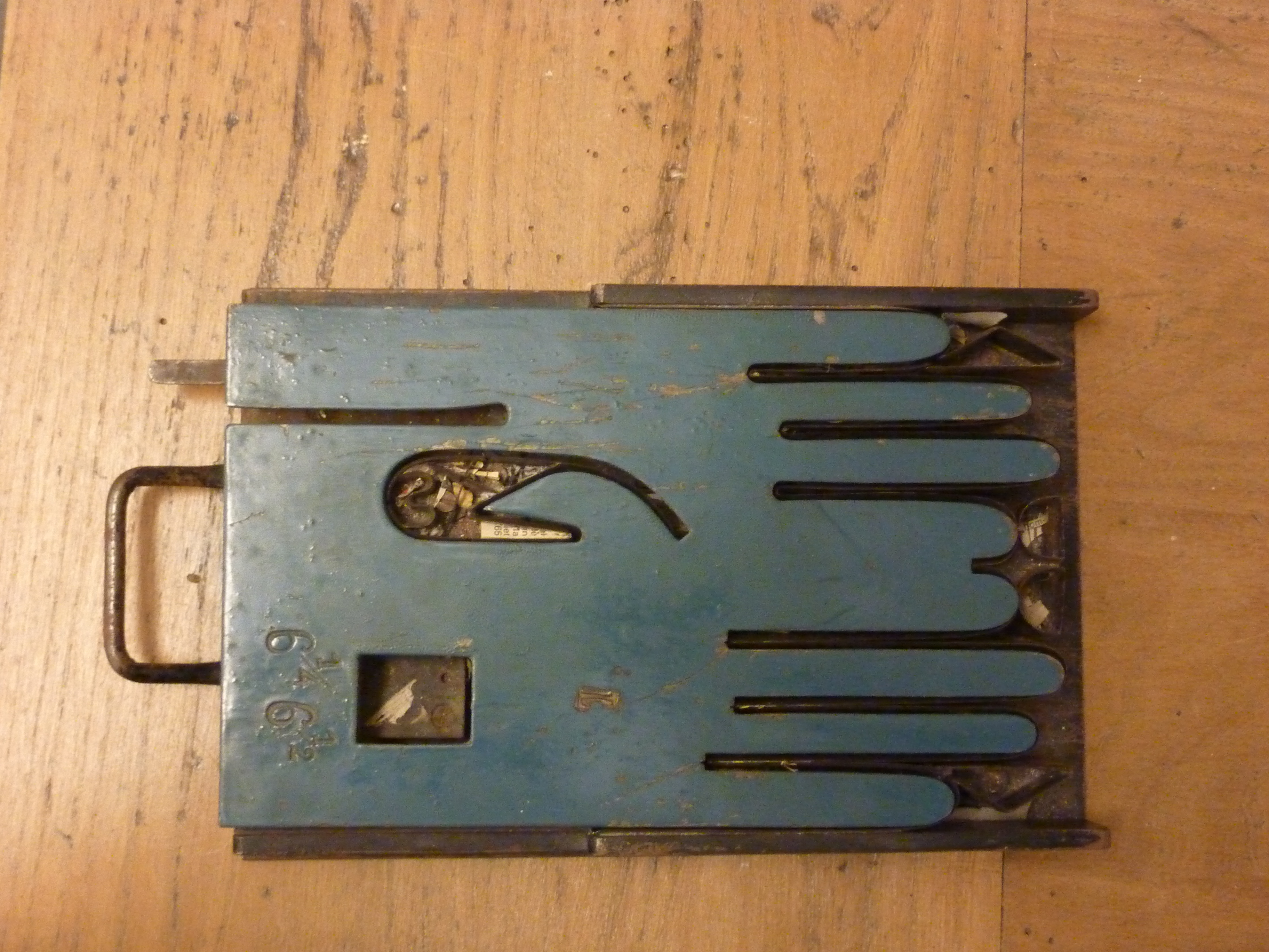 "Main de fer" — outil de gantier grenoblois.